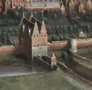 Vroegere Kleine Spui langs waar de Zenne Brussel binnenkwam